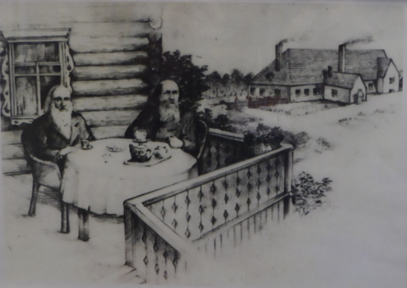 Фото с рисунка В.И. Бландова 1889 года. Справа - школа молочного хозяйства.